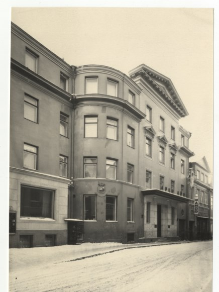 "Kuld Lõvi" ja "Amor" Harju tänaval (Tln Linnamuuseum)